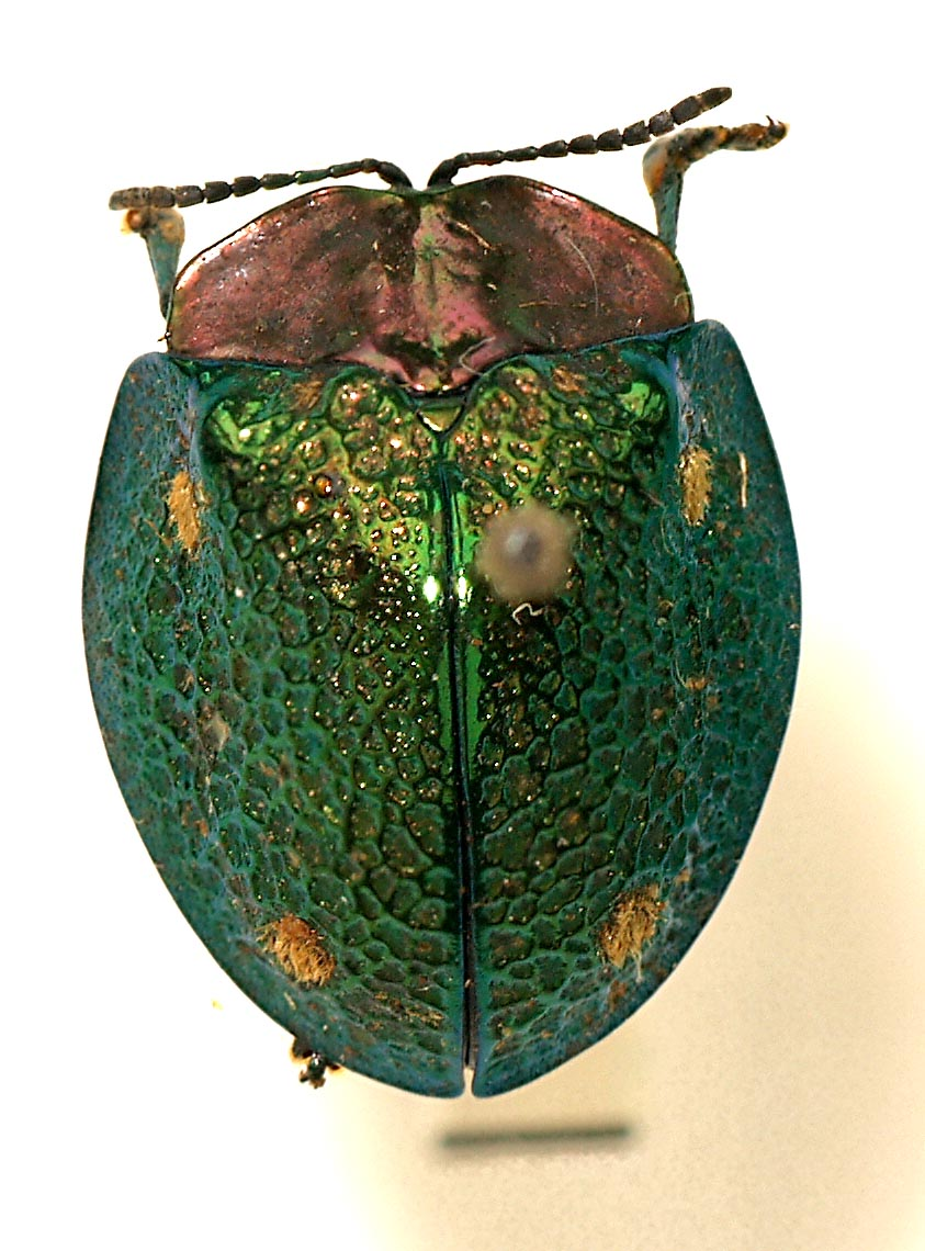 Neomphalia zikani